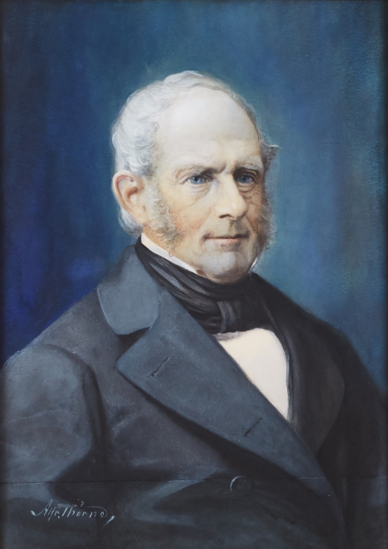 Porträtt av industrialisten Christian Aspelin (1830-1919) av Alfred Thörne från ca 1890.